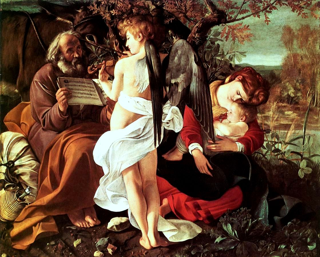 Caravaggio